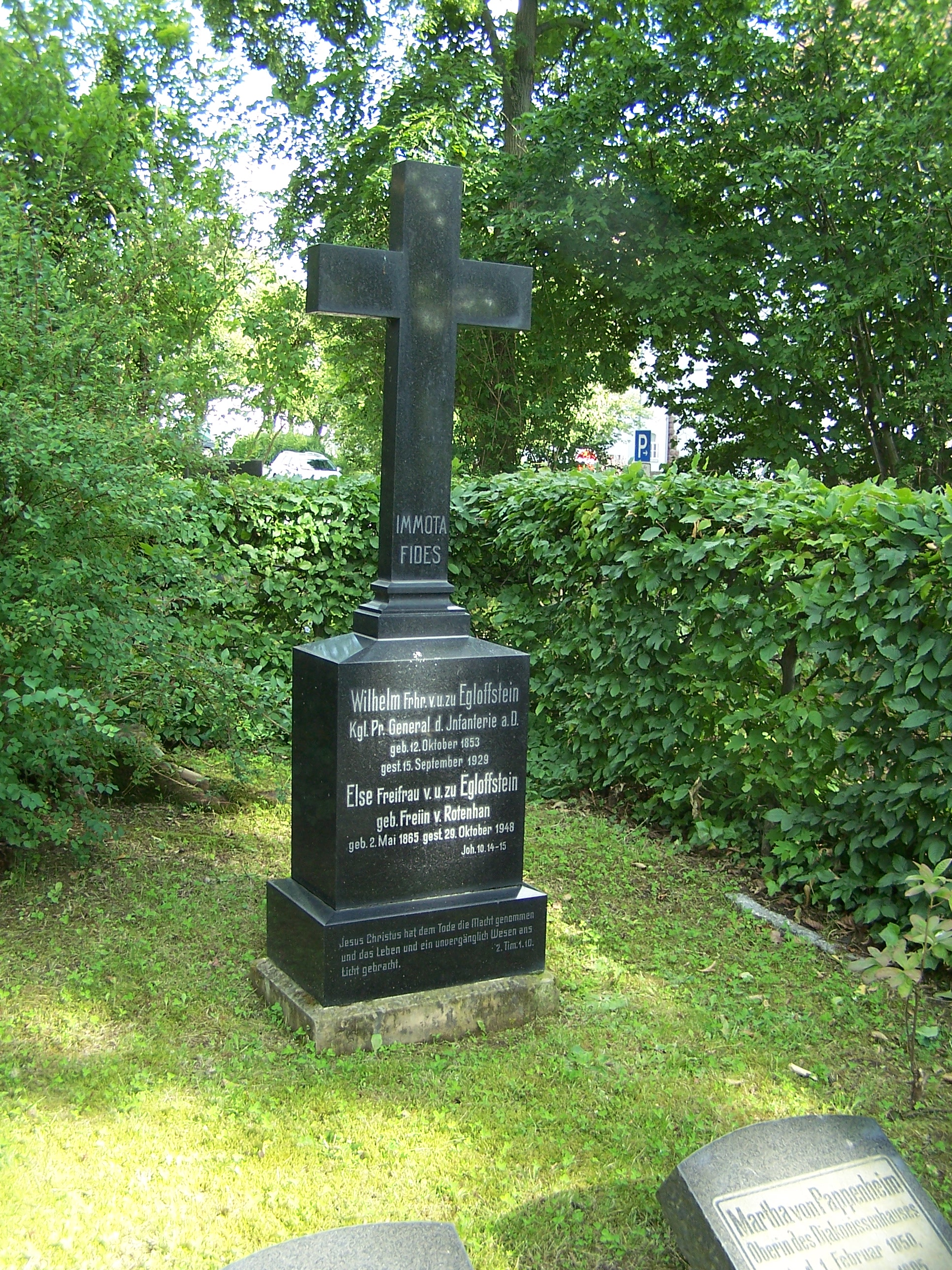 Familengrab auf dem Eisenacher Diakonissen-Friedhof.